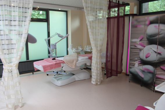 Kosmetikraum im Wellnessbereich Nienhausen